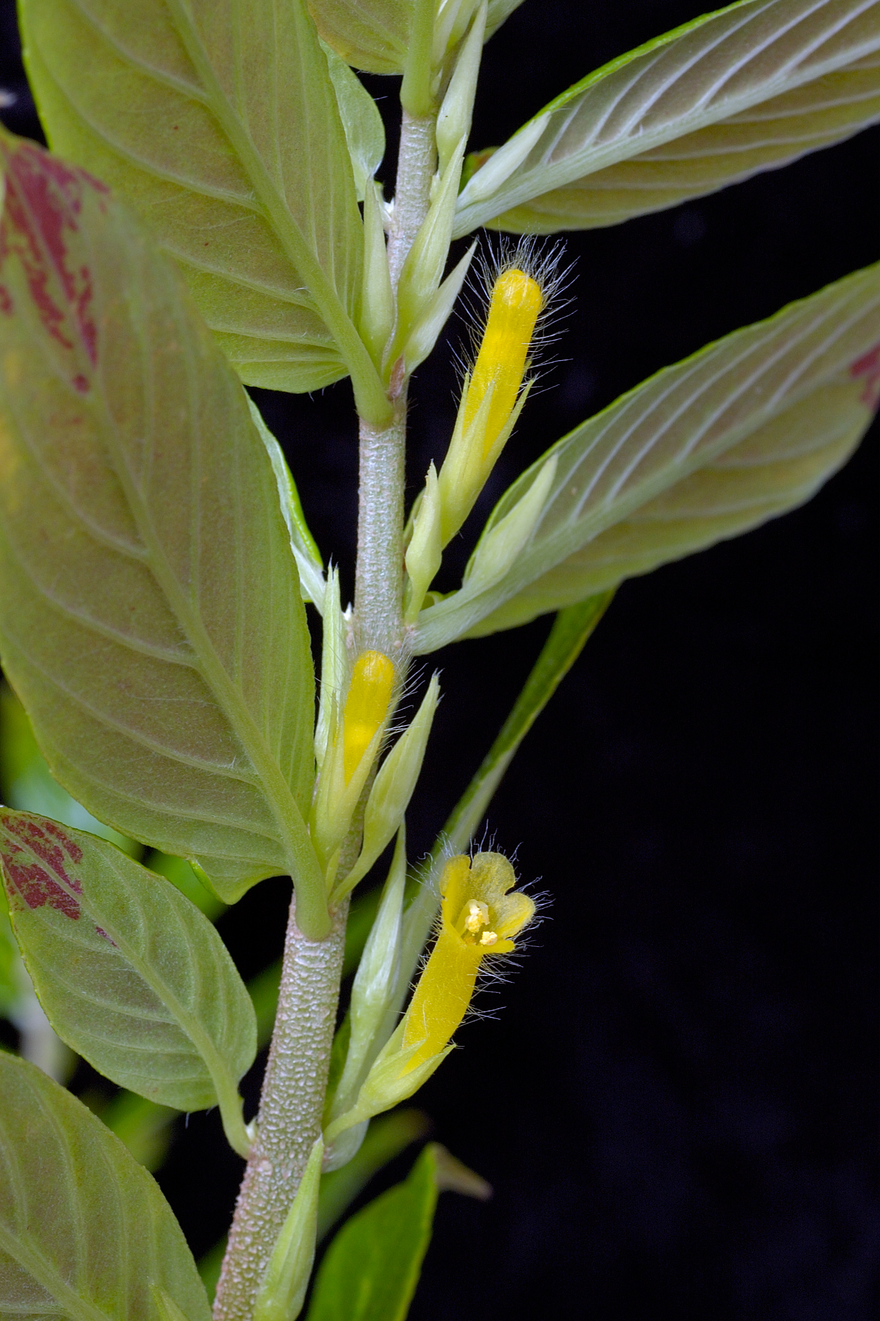 Columnea orientandina, species from Ecuador